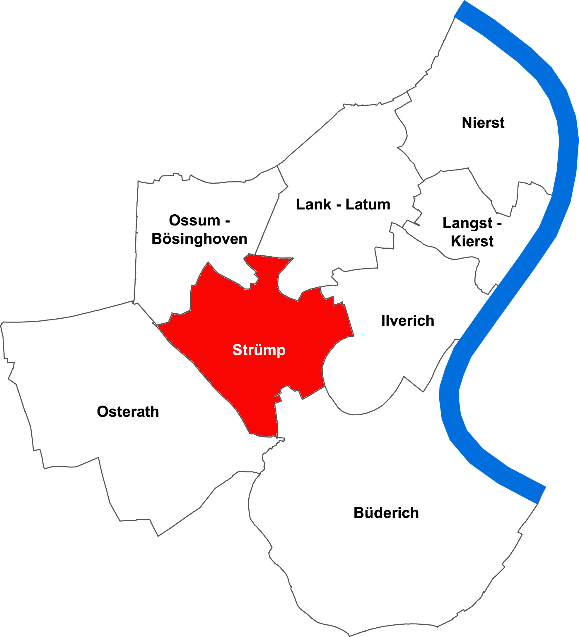 Lageplan Strümp